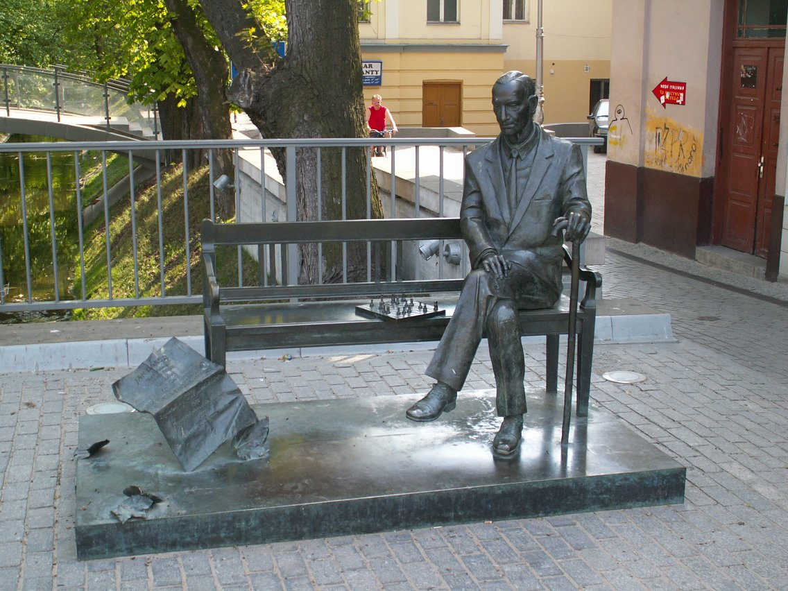 Jan Karski monument in Kielce (Poland)